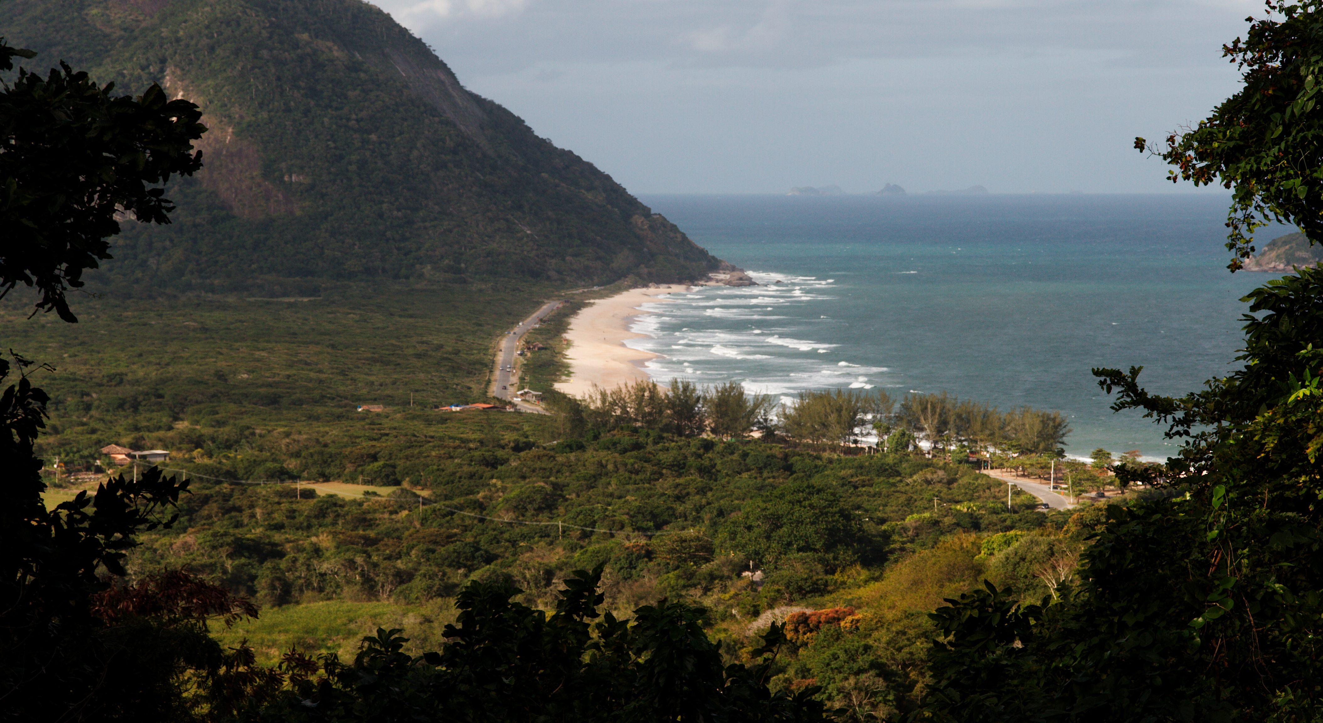 Mirante da Estrada do Grumari